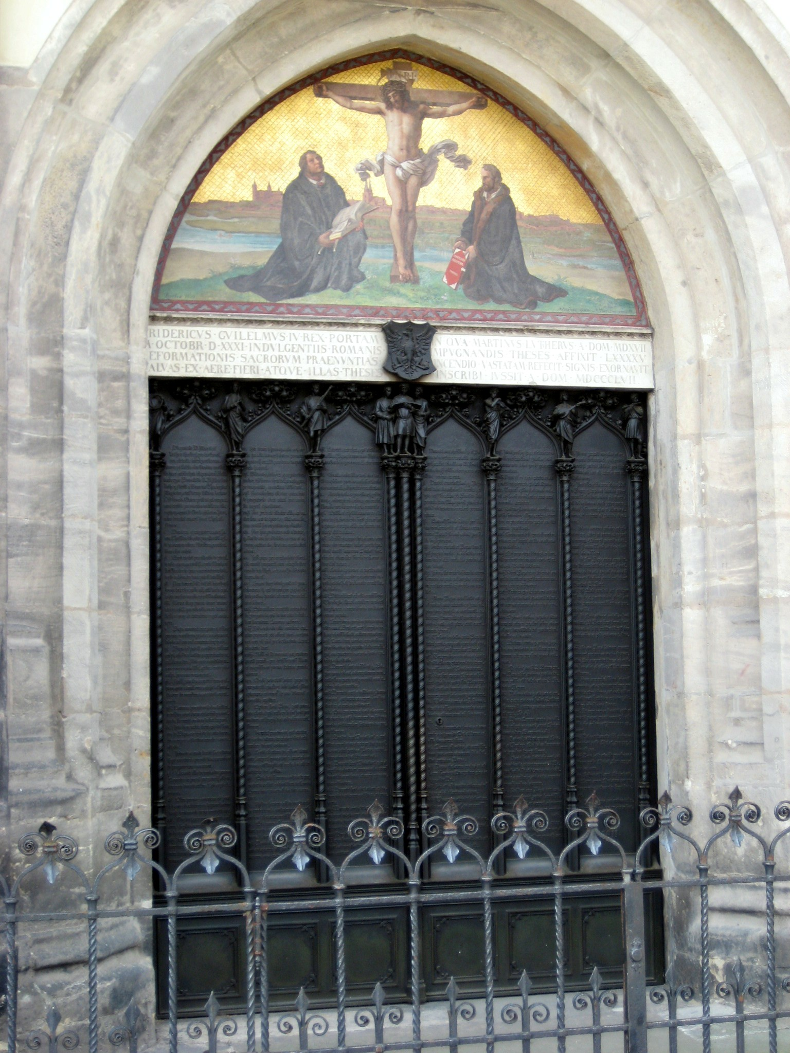 95-Thesen-Tür in Wittenberg